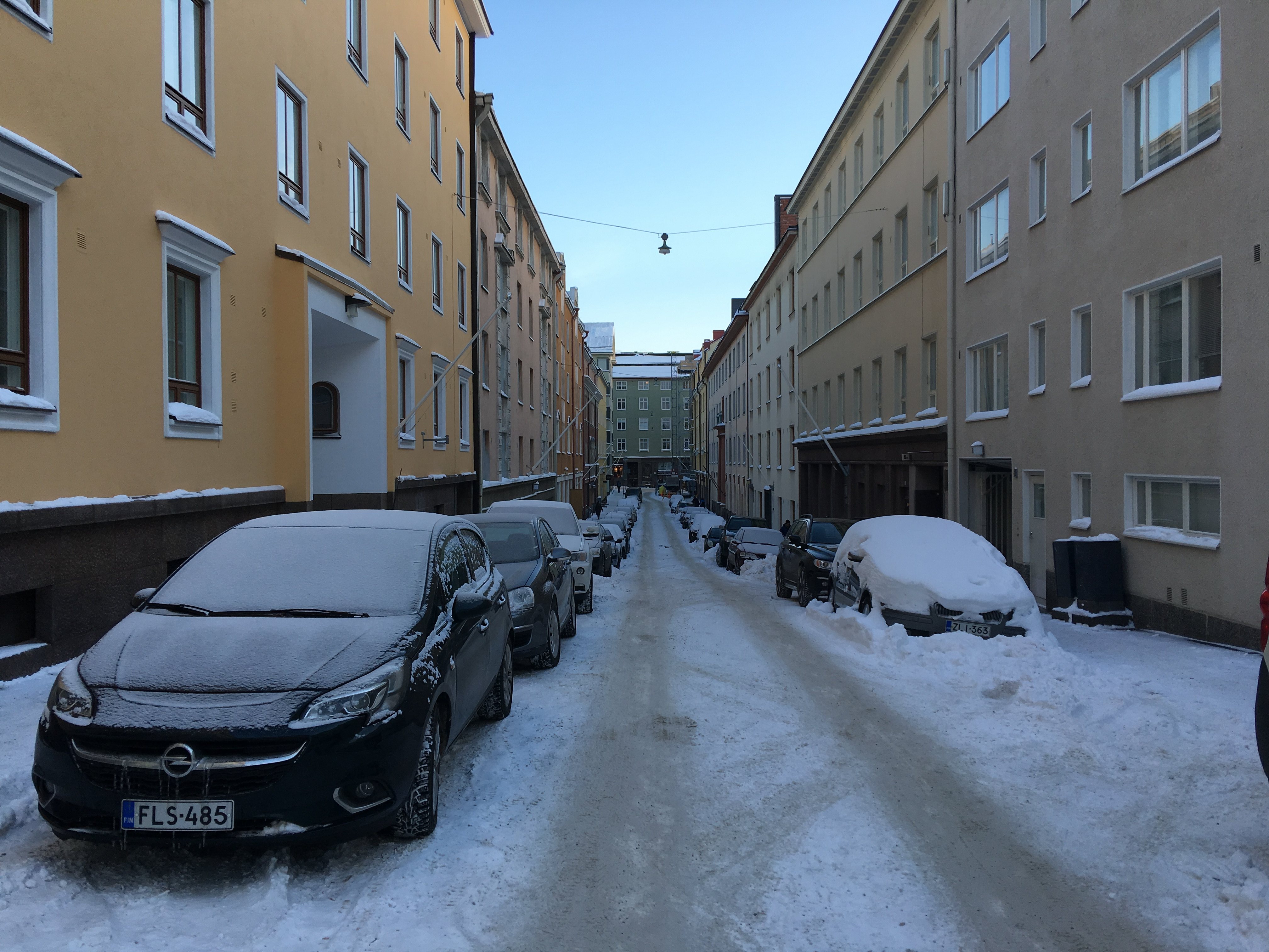 Jääkärinkatu Ullanlinnassa, Helsingissä.